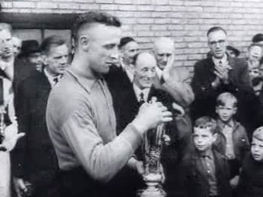 Henk Mes, doelman en aanvoerder van Willem II met de Nederlandse voetbalbeker.